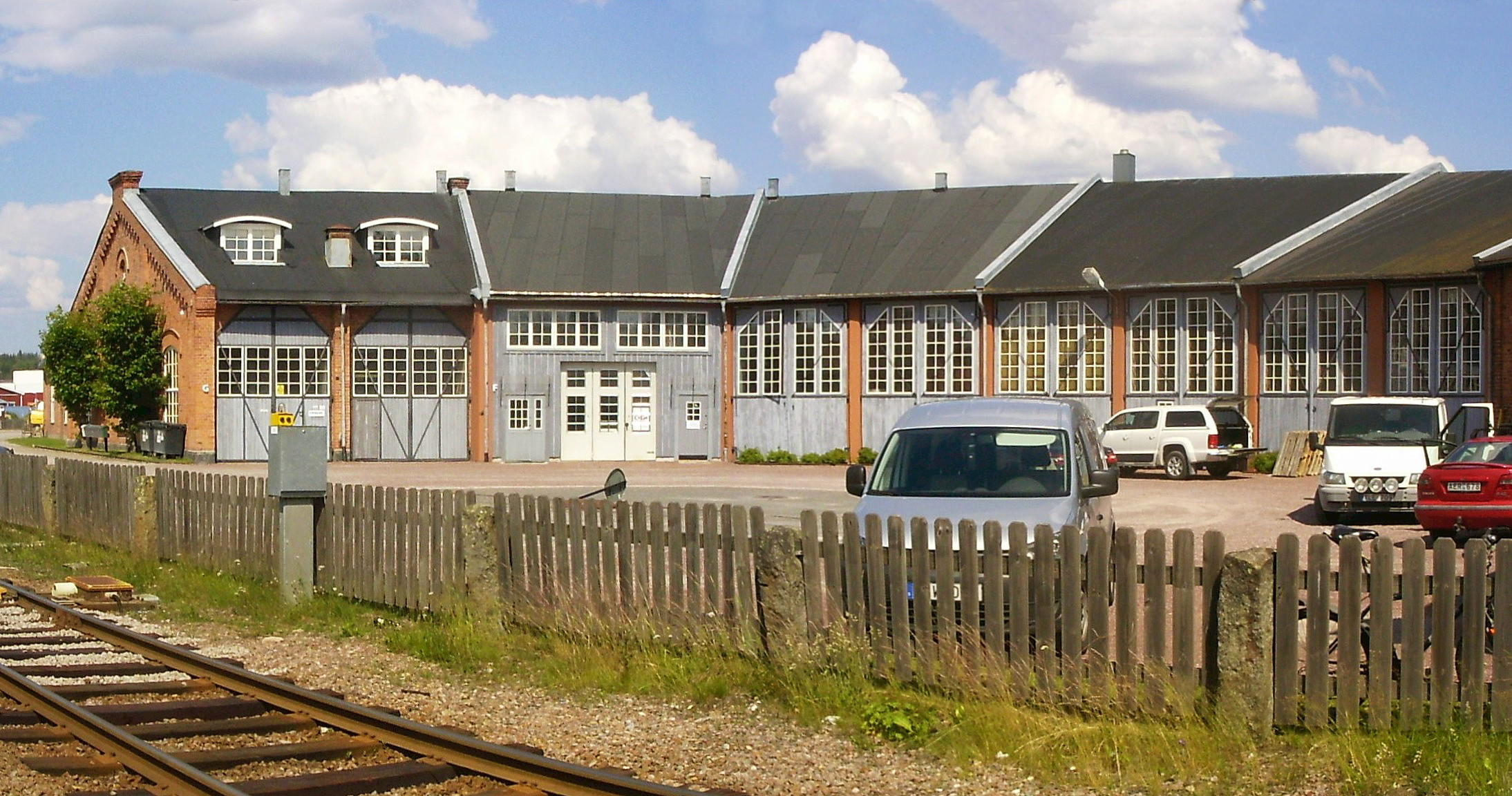 Vansbro, locomotiefloods